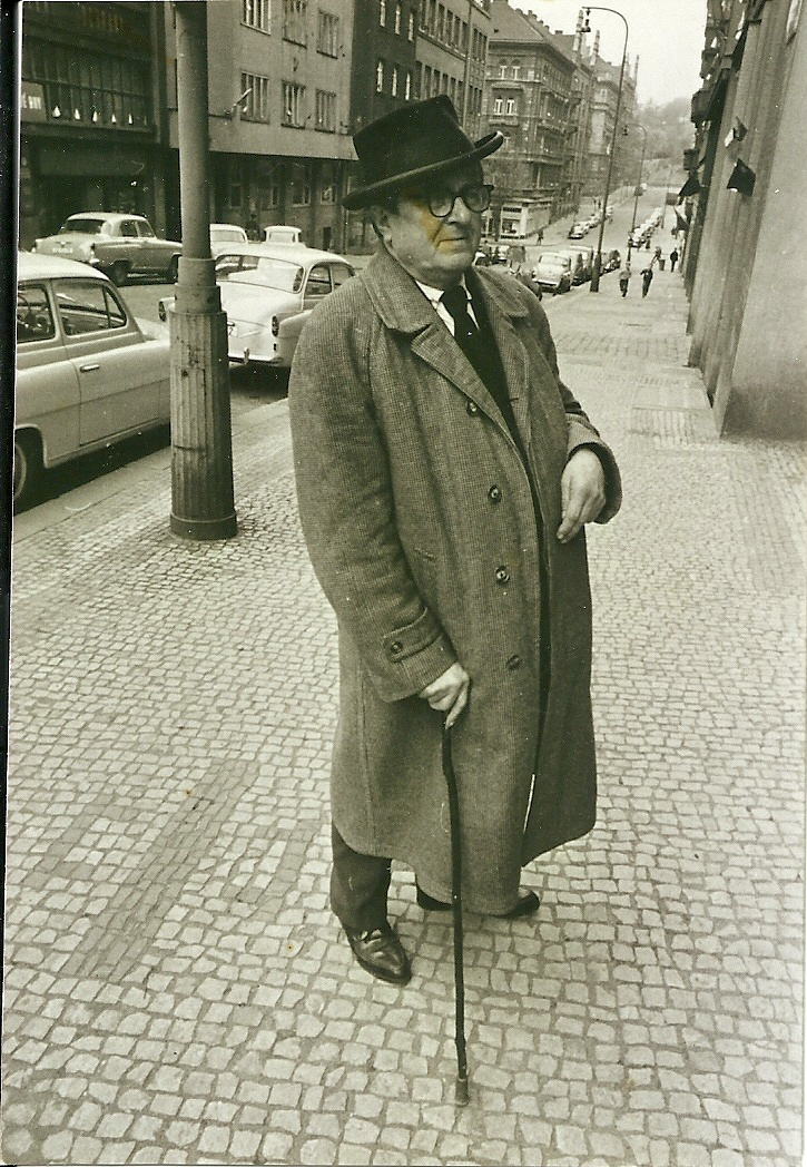 J. Vavřík-Rýz - poslední fotografie